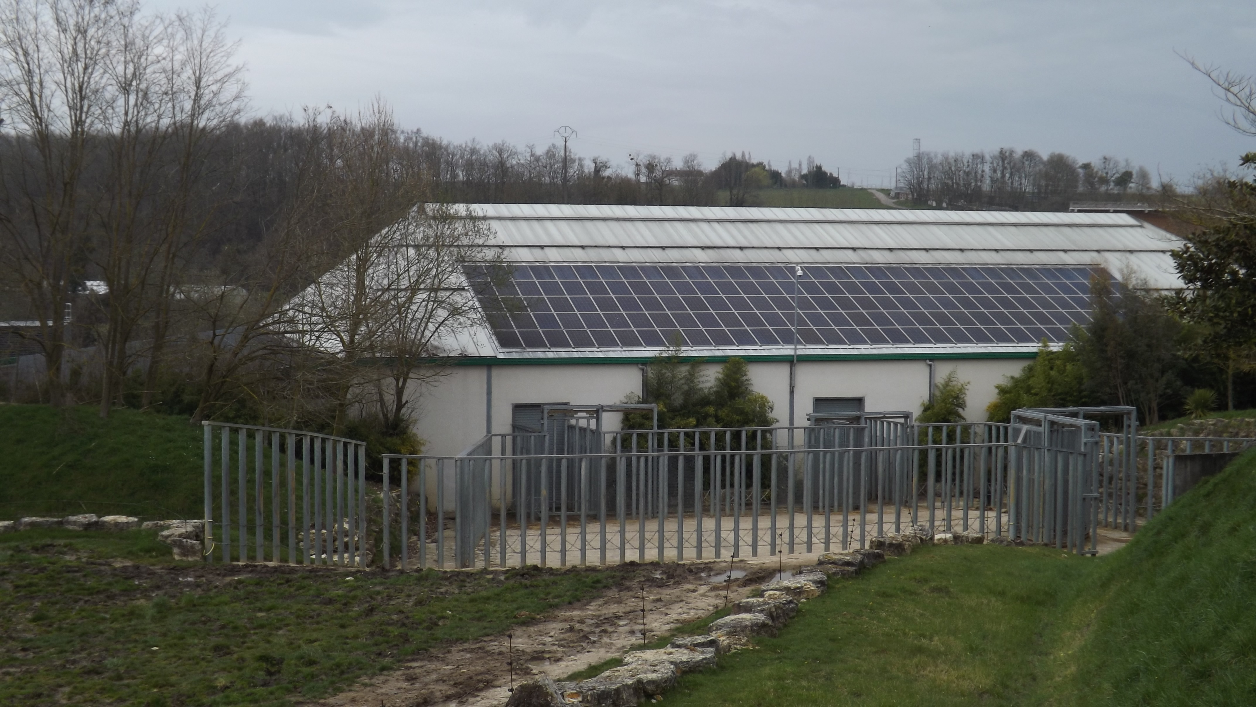 Panneaux solaires sur le toit de la maison des éléphants du ZooParc de Beauval